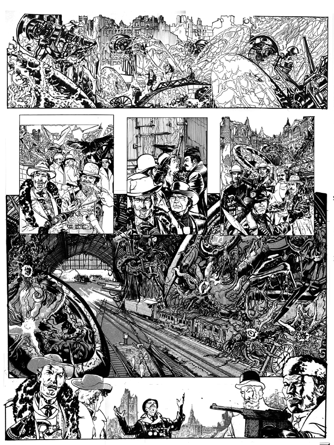 tavola bn inedita racconti fantastici